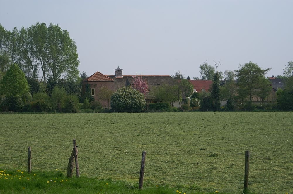 Ridderhofstad Stuivenes te Achterberg.